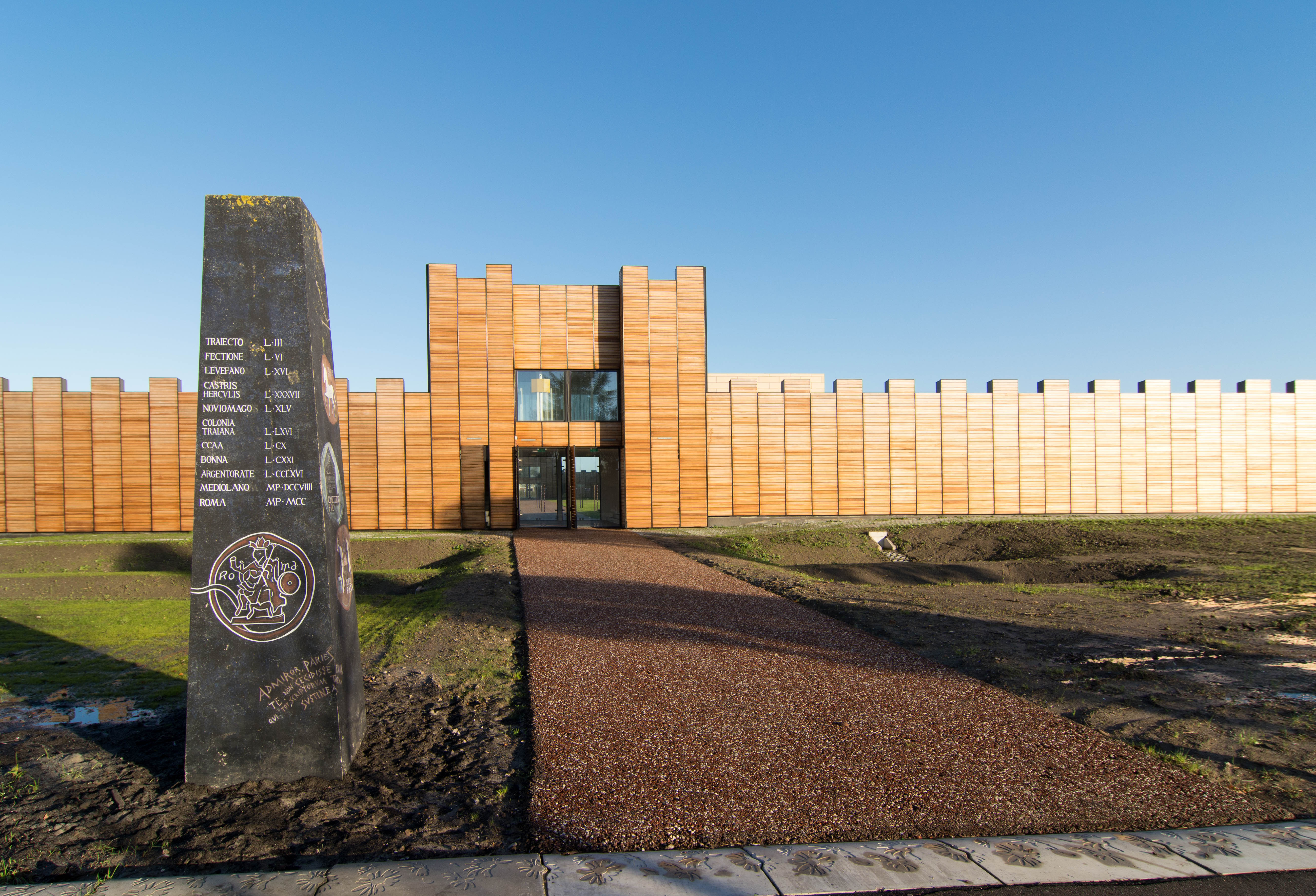 Op de vindplaats is een Romeins castellum nagebouwd. Daarin bevindt zich ook een Romeins schip dat in de wijk Veldhuizen in De Meern is gevonden.